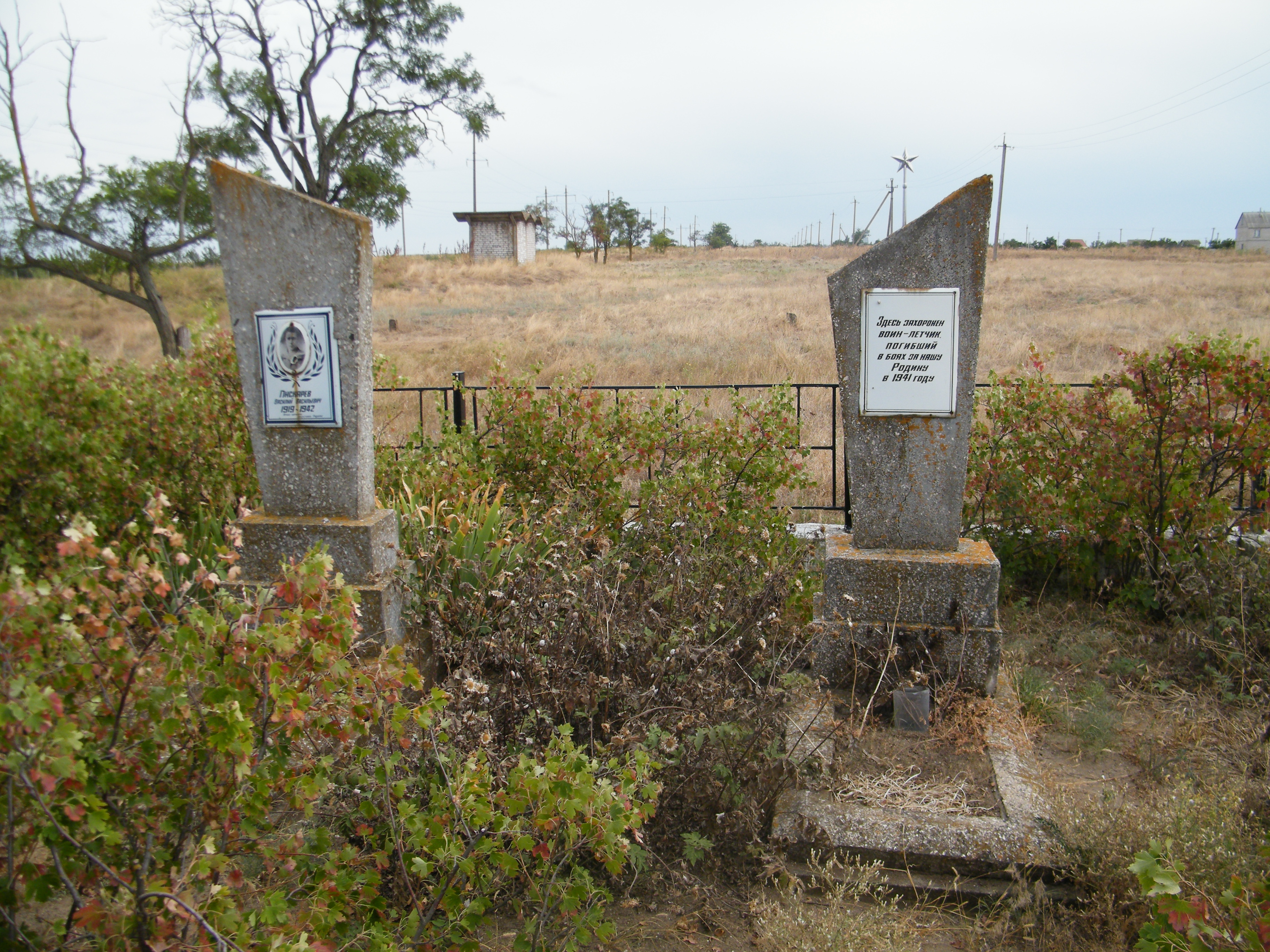 Осетрівка. Могили радянських воїнів, загиблих у Другій світовій війні